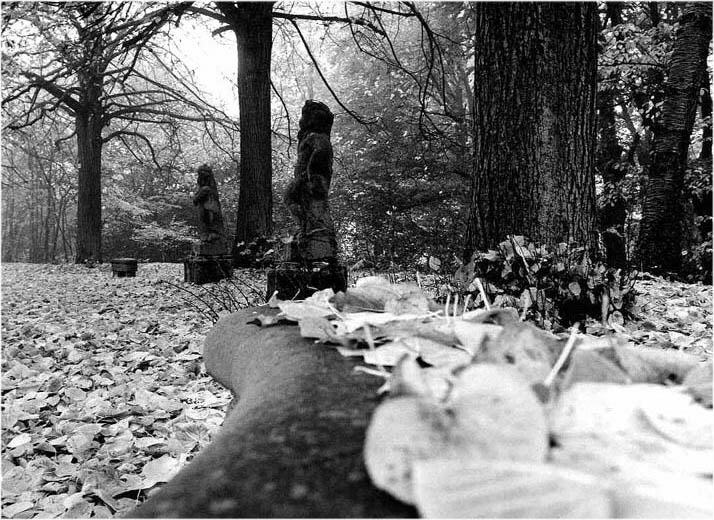 Im Schlosspark des Schwanbergs